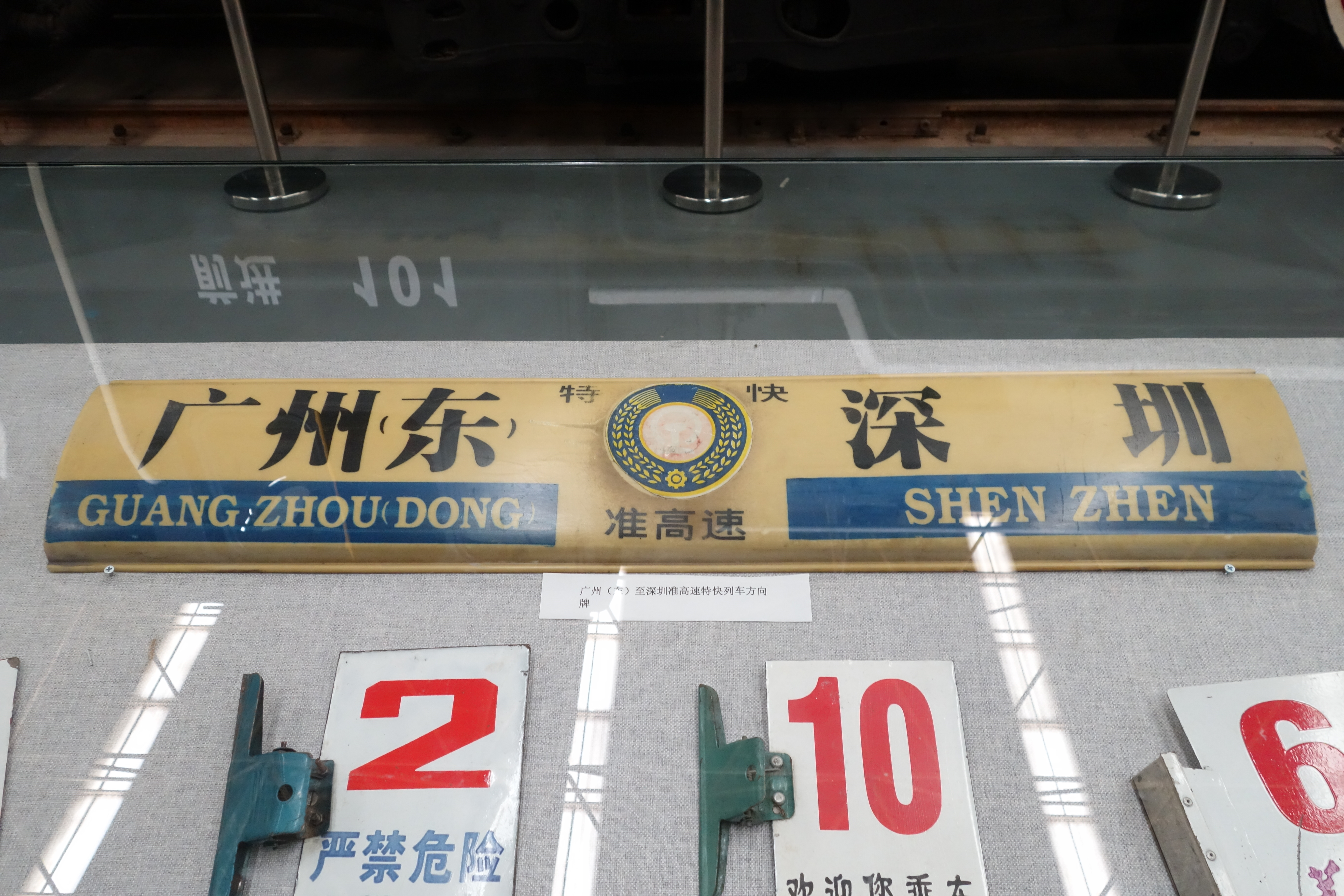 广深准高速列车水牌